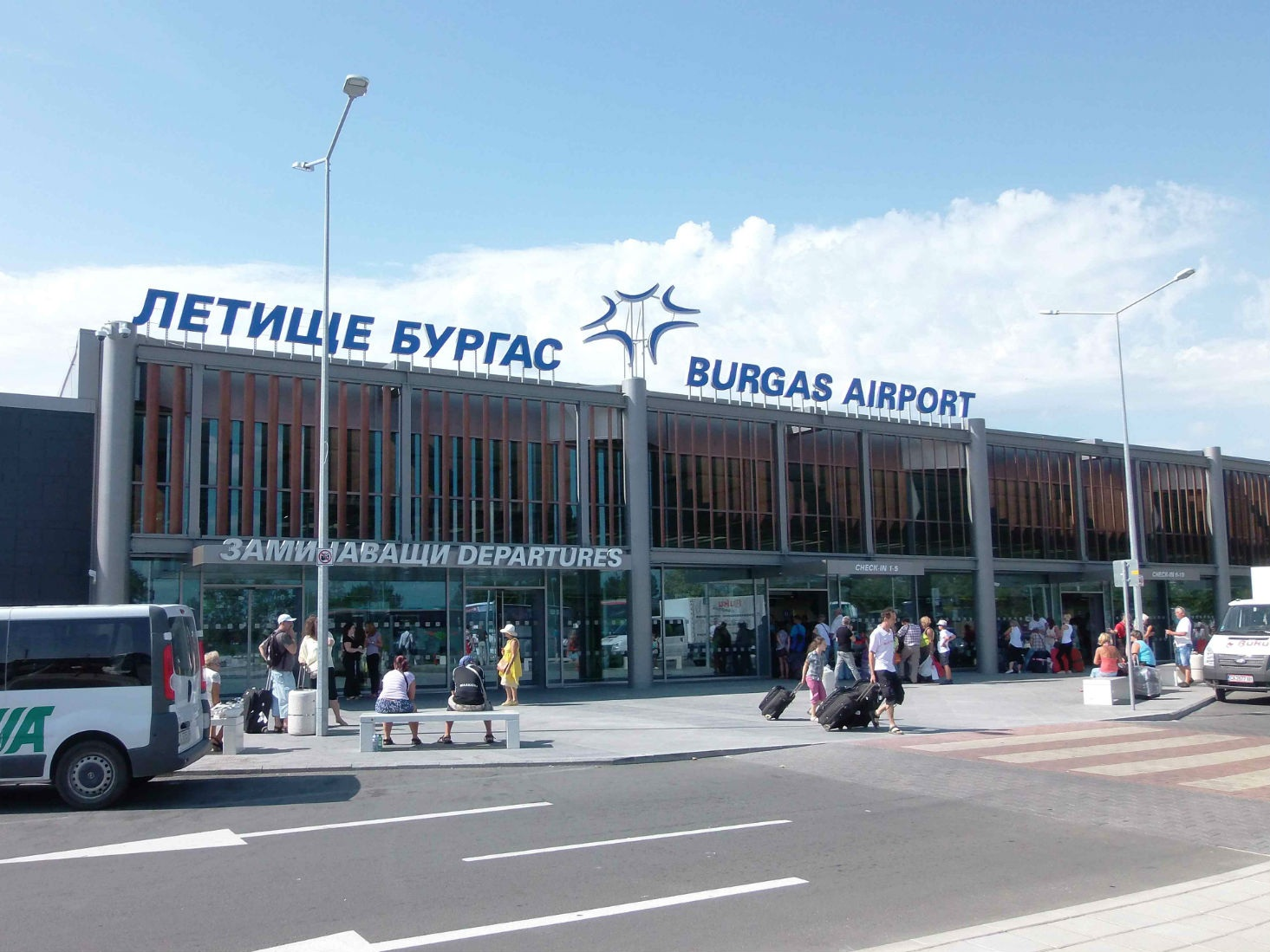 Новый терминал аэропорта Бургас